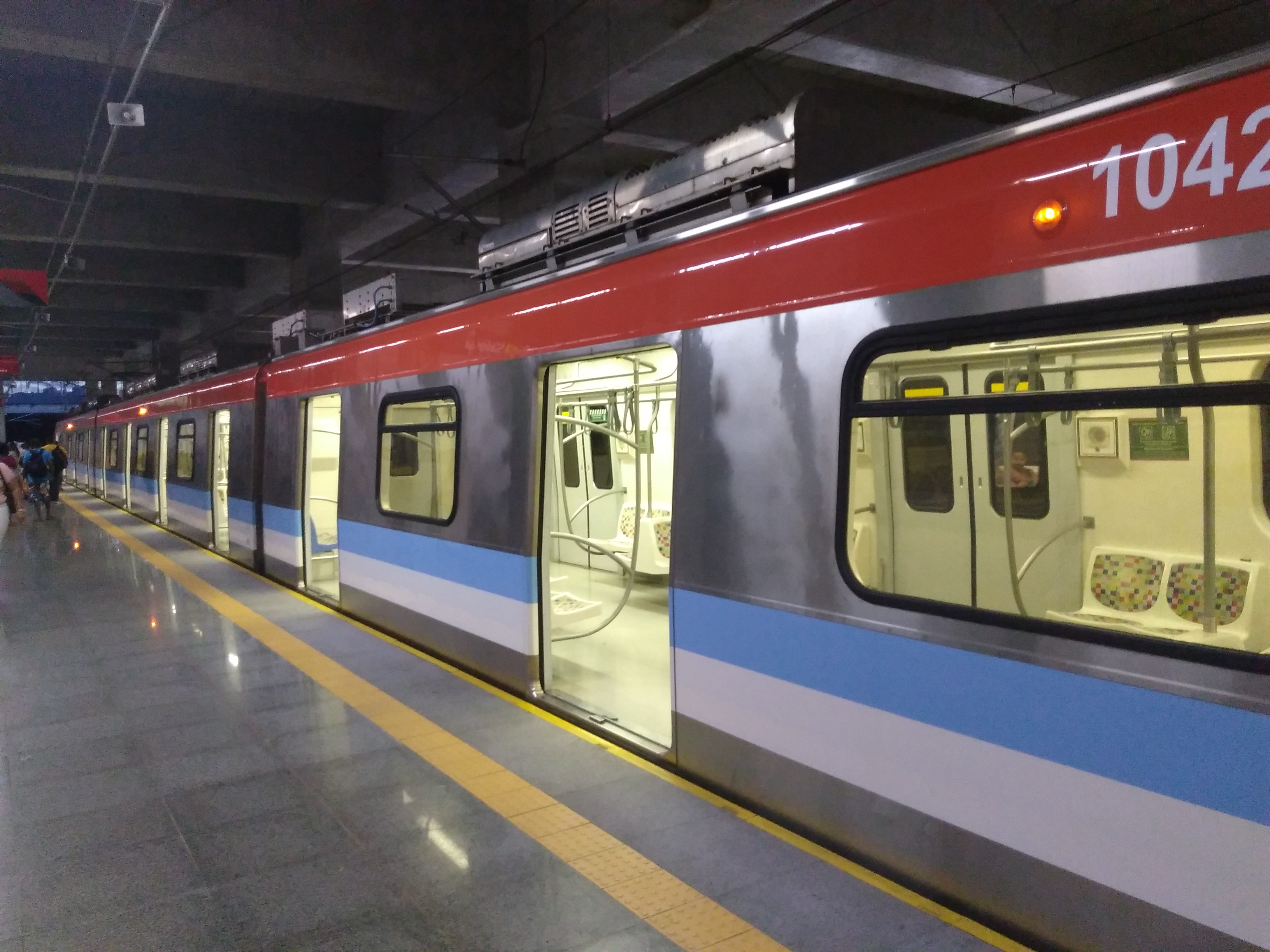 Estação Pirajá do sistema metroviário Salvador - Lauro de Freitas, BA